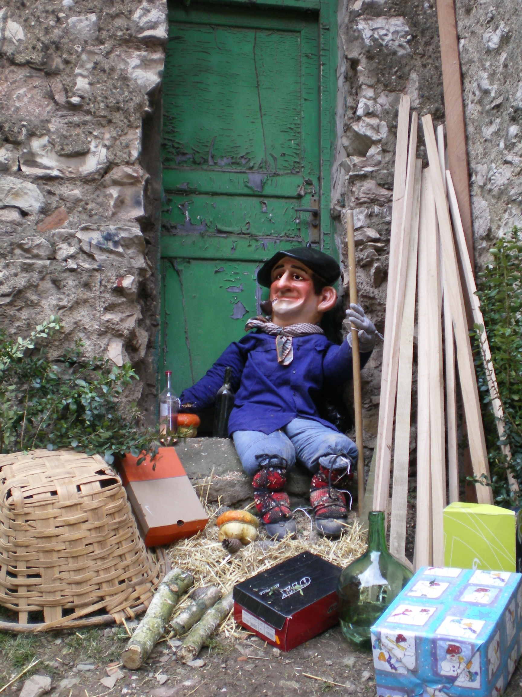 Olentzero Lezoko (Gipuzkoa) Kale Nagusian 2007